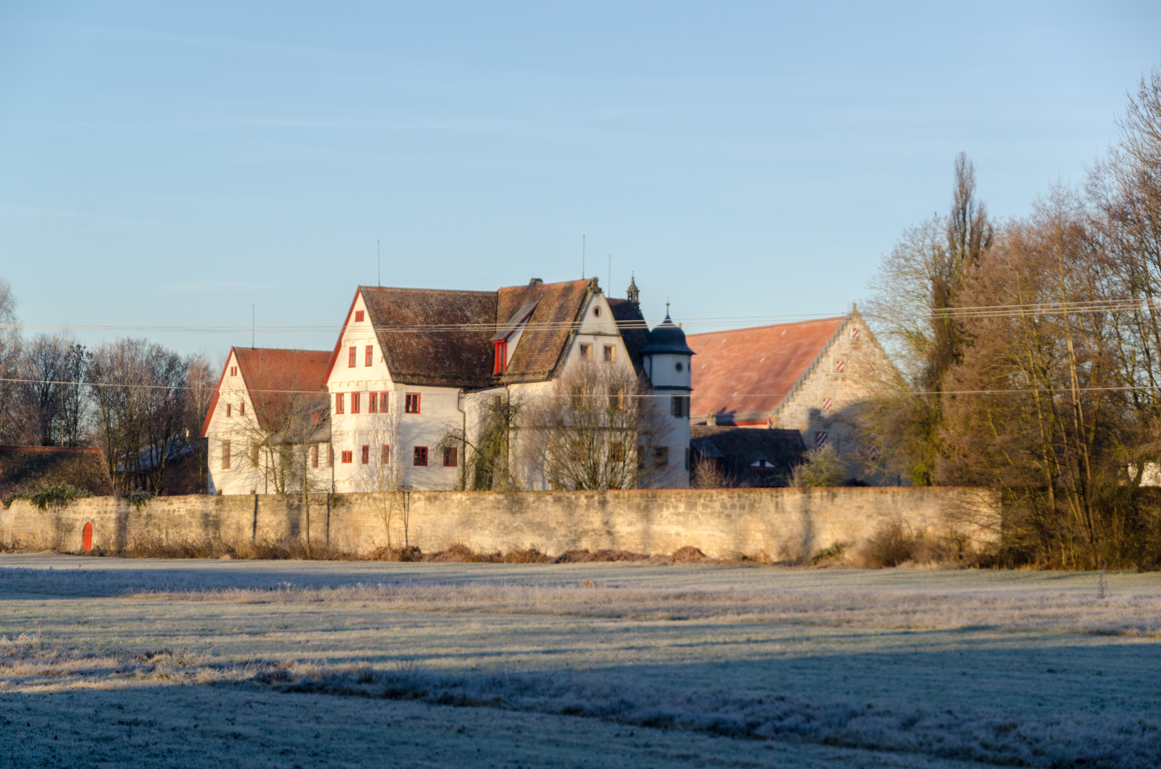 Gebsattel, Schloss